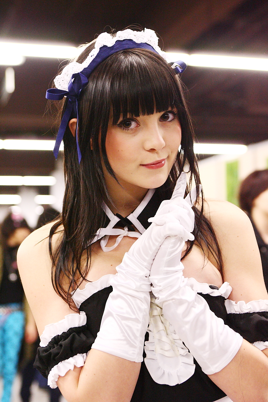 Paris Manga 9 -Cosplay